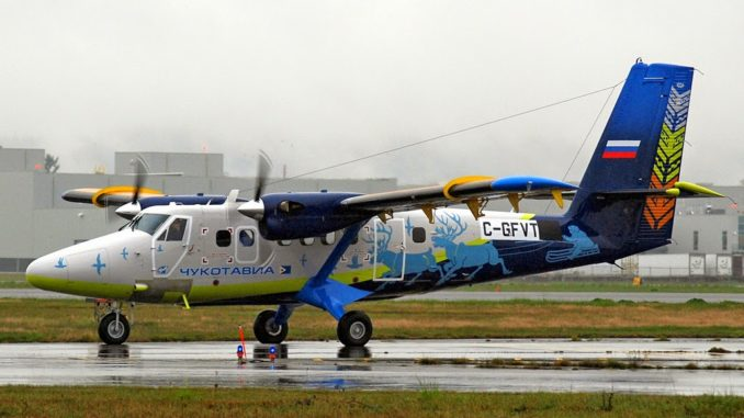 DHC 6